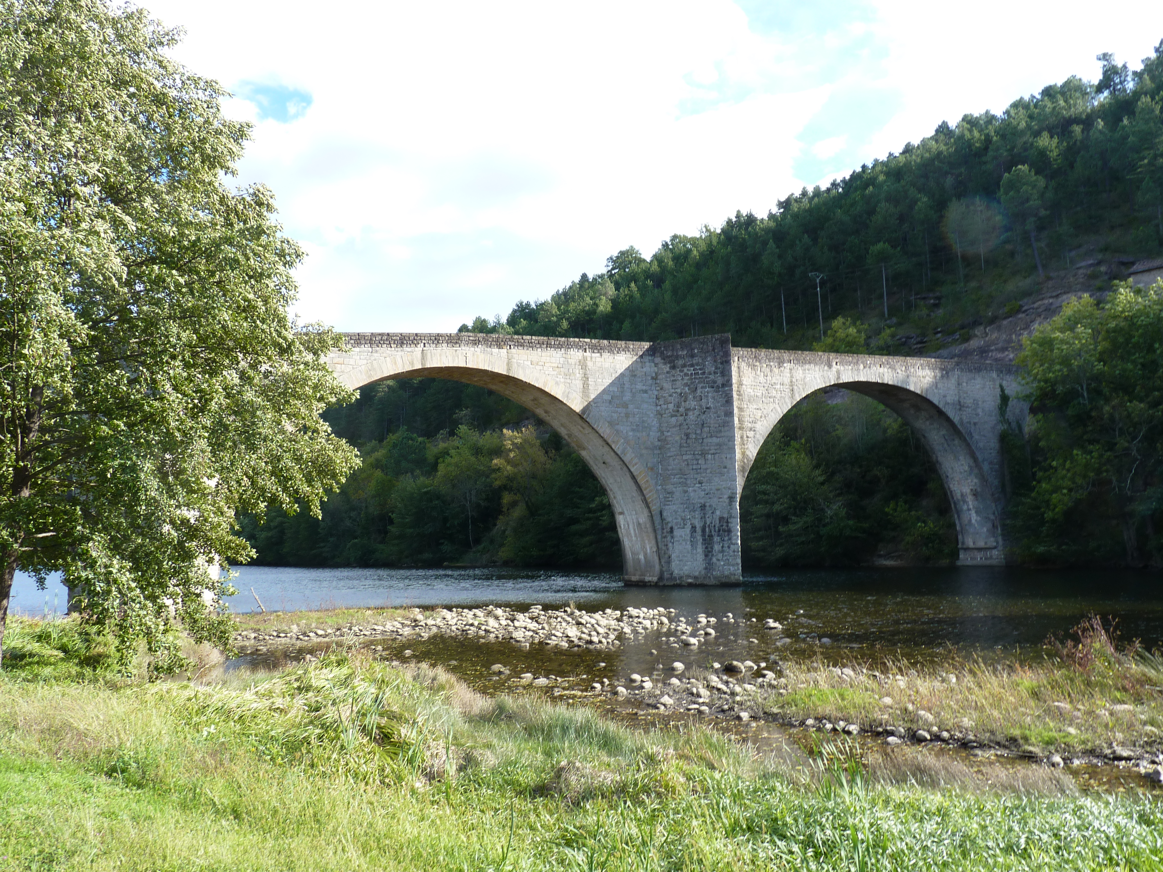 Le pont de Chambonas dans le département de l'Ardèche : construit au XIIIe siècle par les moines de Saint Gilles, endommagé en août 1944 et reconstruit depuis.